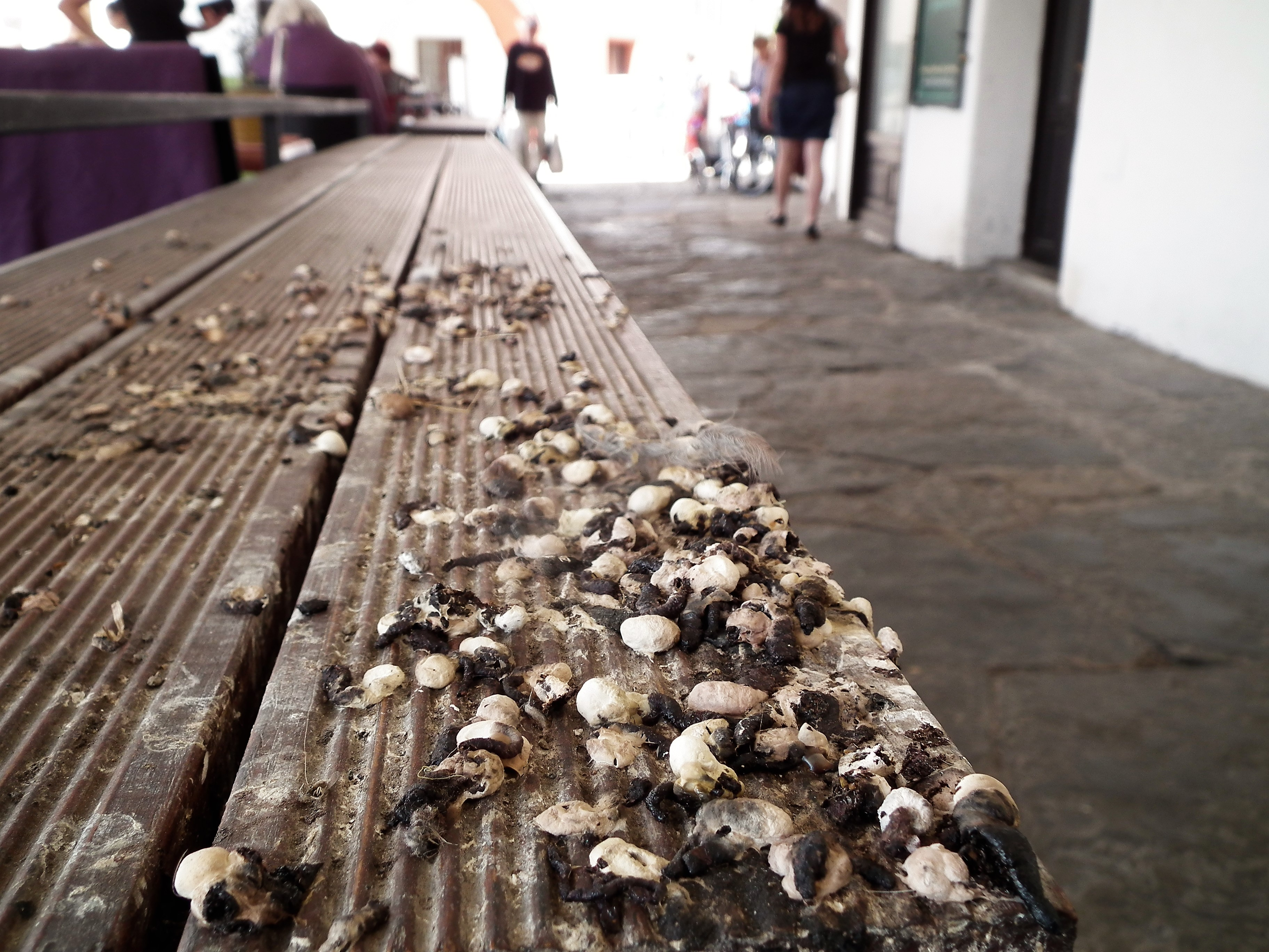 Ptasie odchody na stole - Nw. Miasto nad Metują.